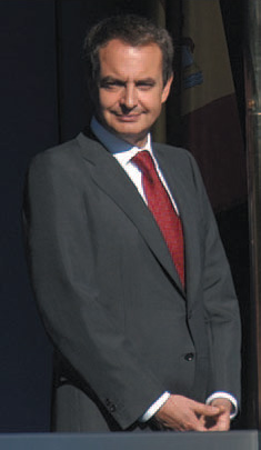 El Presidente del Gobierno de España, Dº José Luis Rodríguez Zapatero. Foto tomada por Luis Jáspez